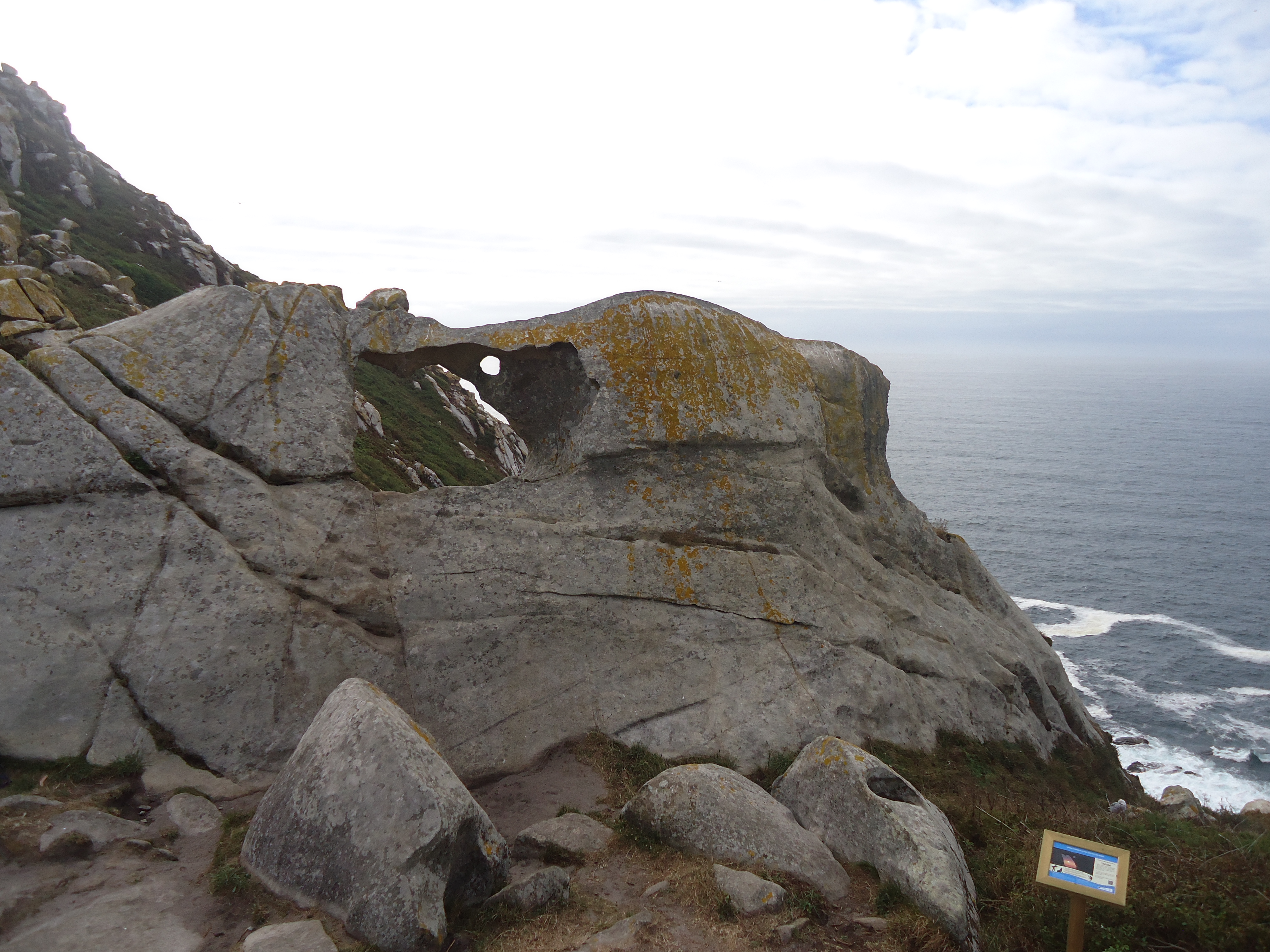 "Pedra da campá", Islas Cíes This is a photography of a Special Area of Conservation in Spain with the ID: ES0000001. Natura2000 entry, EEA entry